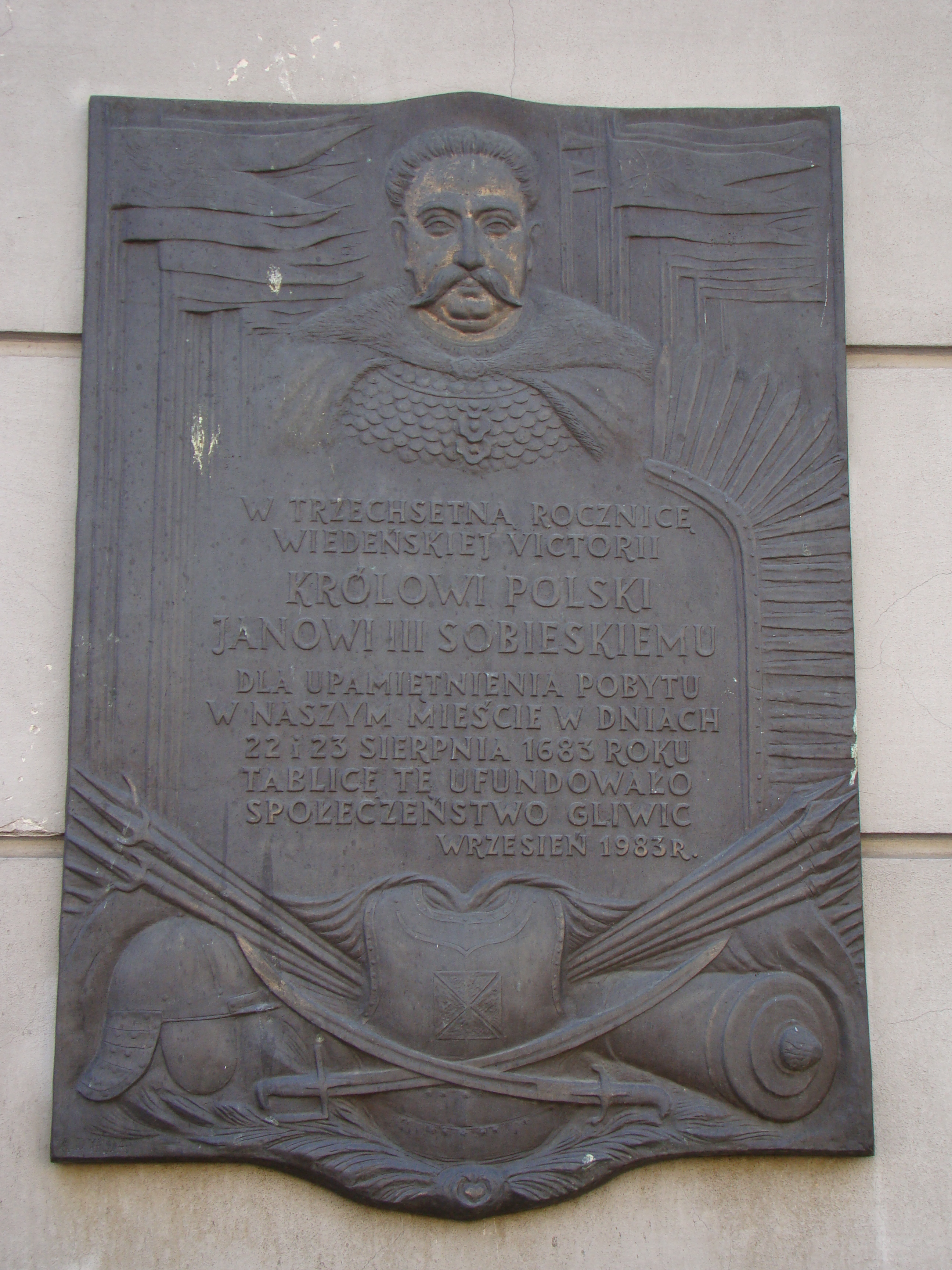 Gliwice, Ratusz z XVIII/XIX wieku, murowany, klasycystyczny, z reliktami z okresu średniowiecza. Granice ochrony obejmują parcelę budowlaną.